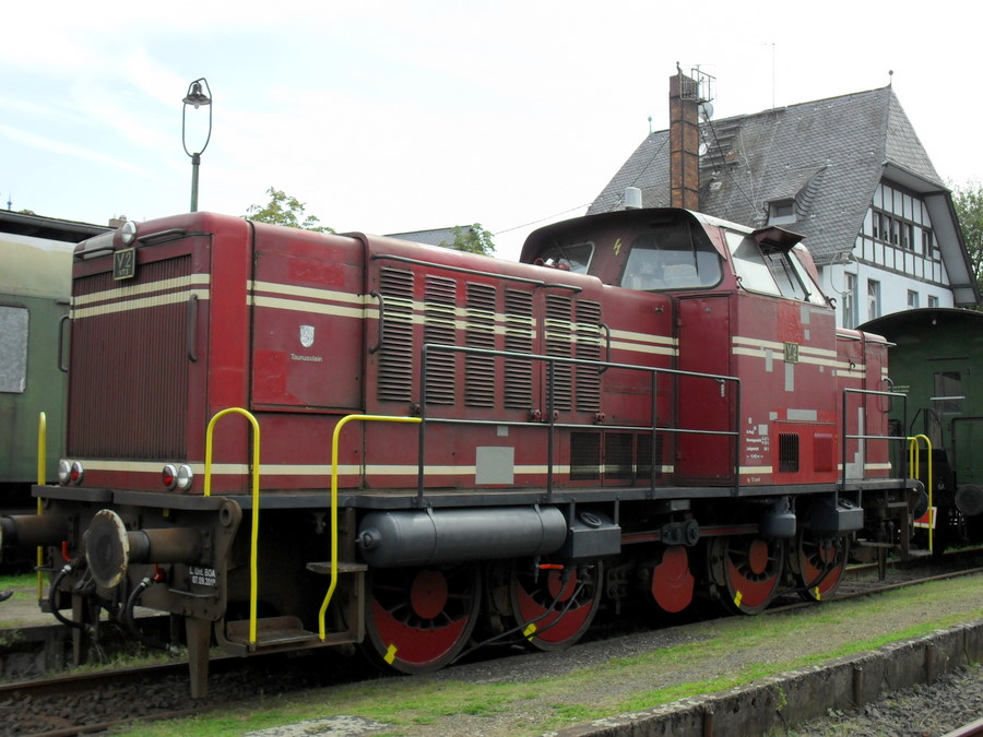 Diesellok MaK 650 D der Nassausischen Touristik-Bahn